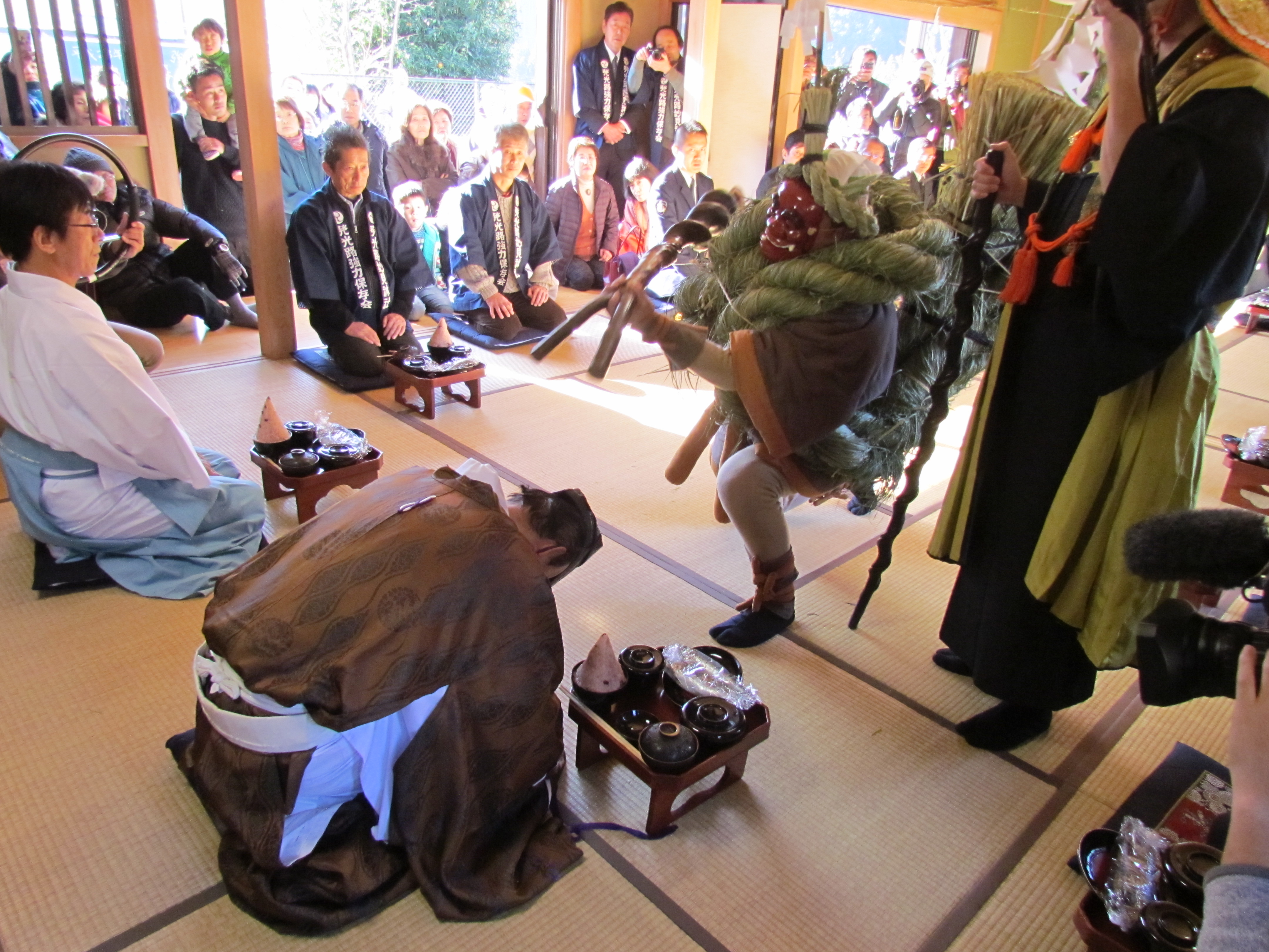 一年間当番を務めた古太夫を強力がねぎらう。